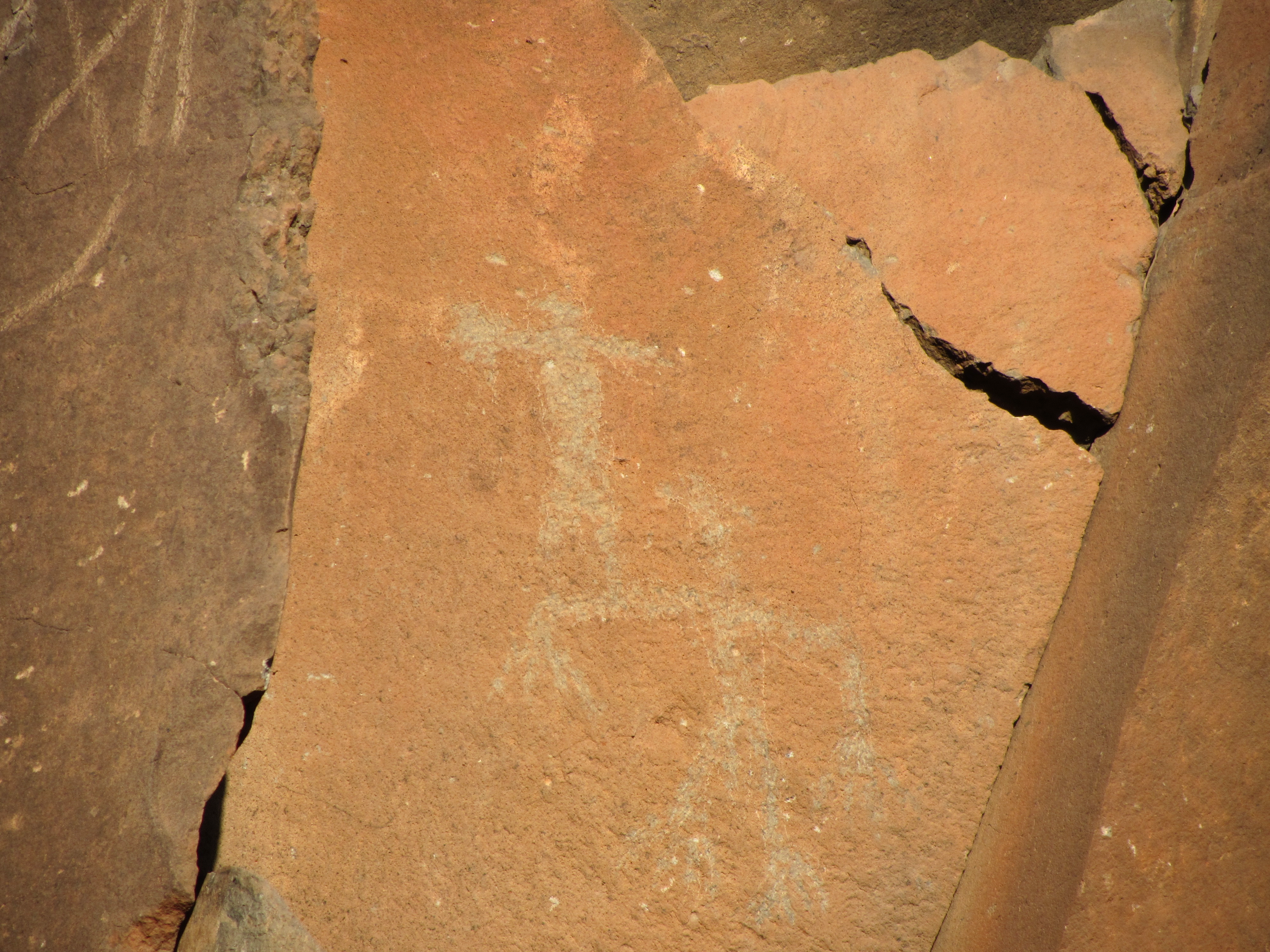 Grabados rupestres del barranco de Balos, Agüimes, Gran Canaria.